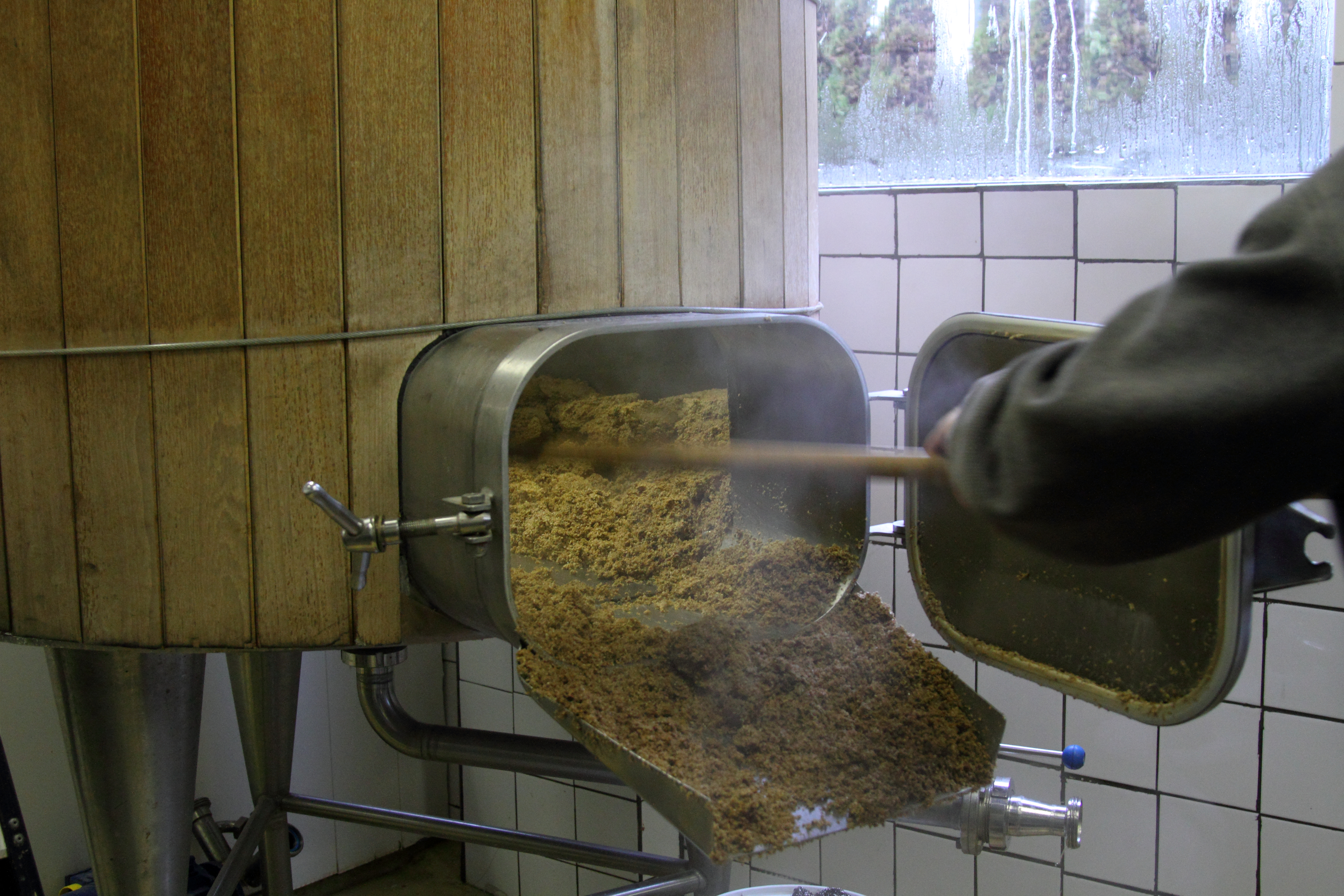 Beer brewery "de Molen", Bodegraven